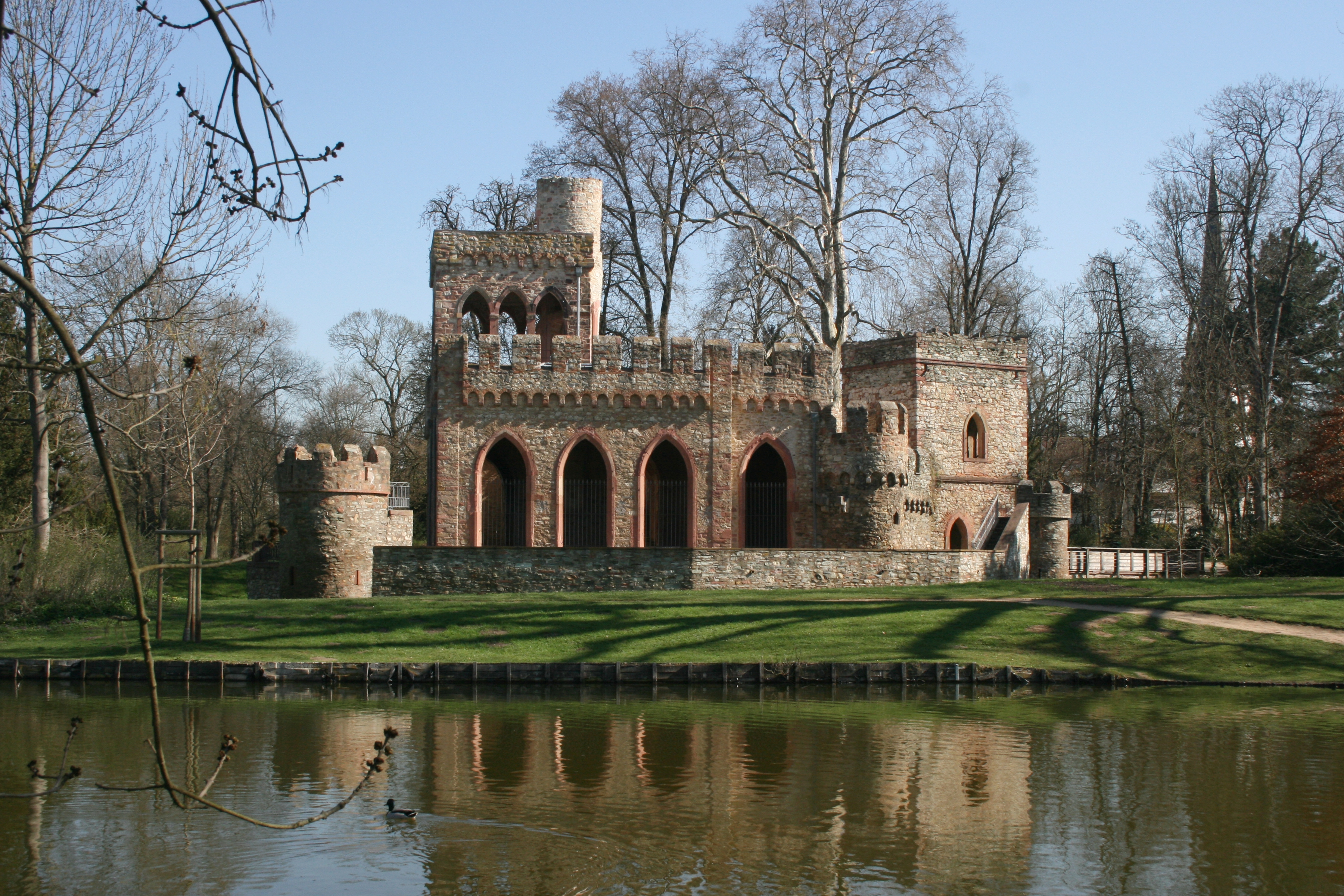 Mosburg im Biebricher Schlosspark, Ansicht von Süden.